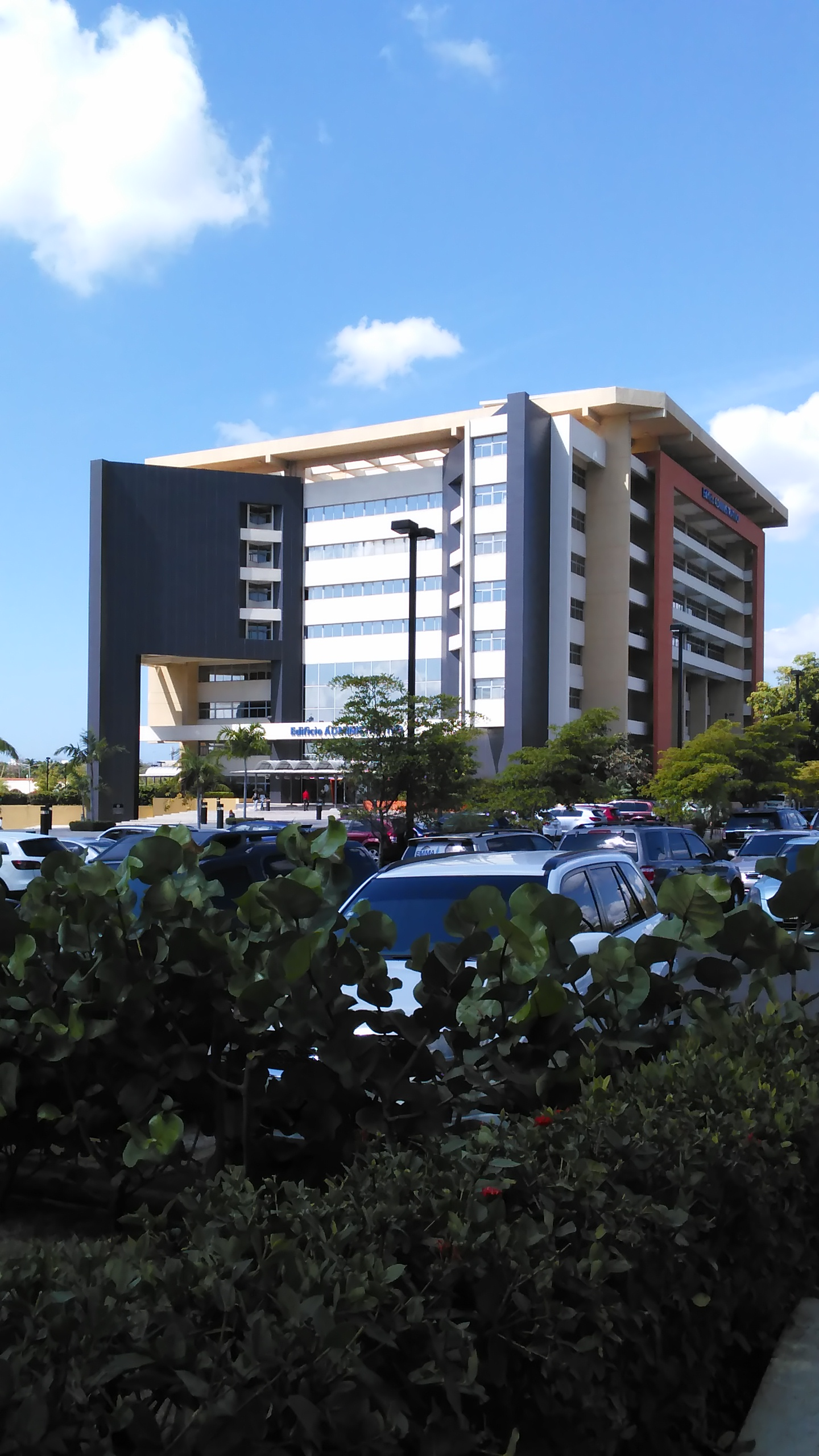 Edificio Administrativo UASD